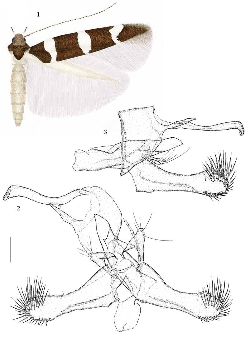 1. Hodgesiella quagella; 2. Hodgesiella quagella (Christoph, 1887), male genitalia; 3. Hodgesiella quagella (Christoph, 1887), male genitalia, laterally, scale 0.1 mm.